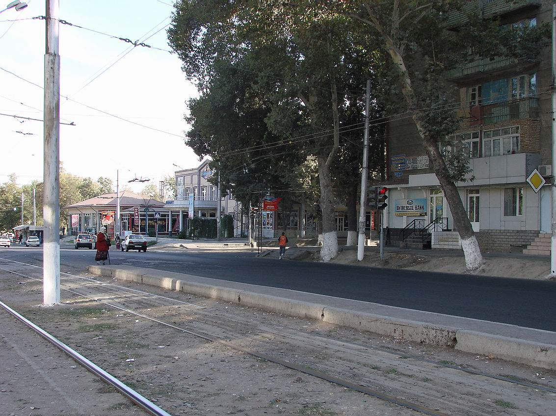 Ташкент. Фотография первого кирпичного дома в Ташкенте на первом квартале массива Чиланзар. Дом расположен на углу улиц Арнасай (раньше - Пионерская) и Мукими.